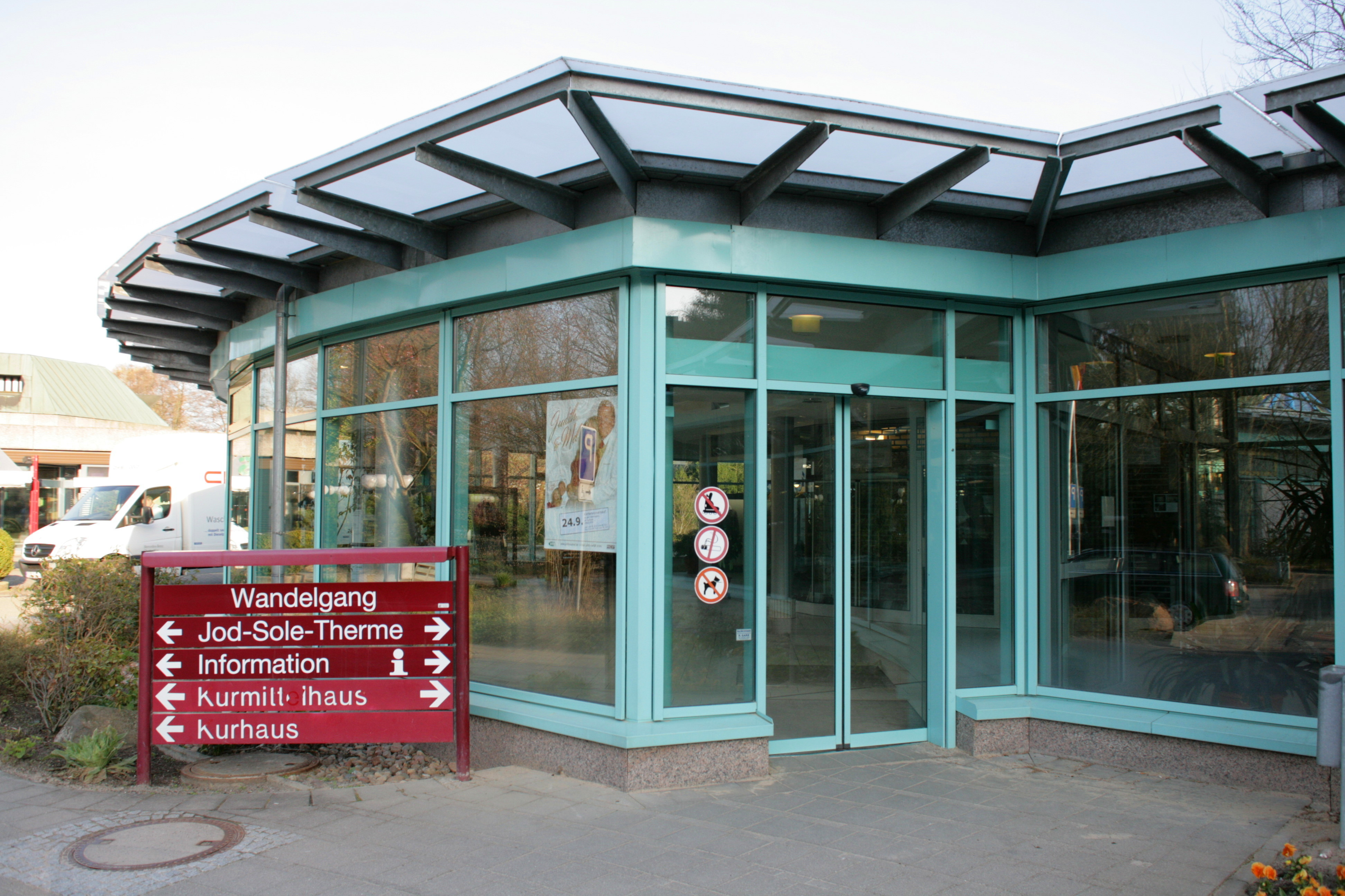 Jod-Sole-Therme im Kurpark an der Dahlenburger Straße in Bad Bevensen